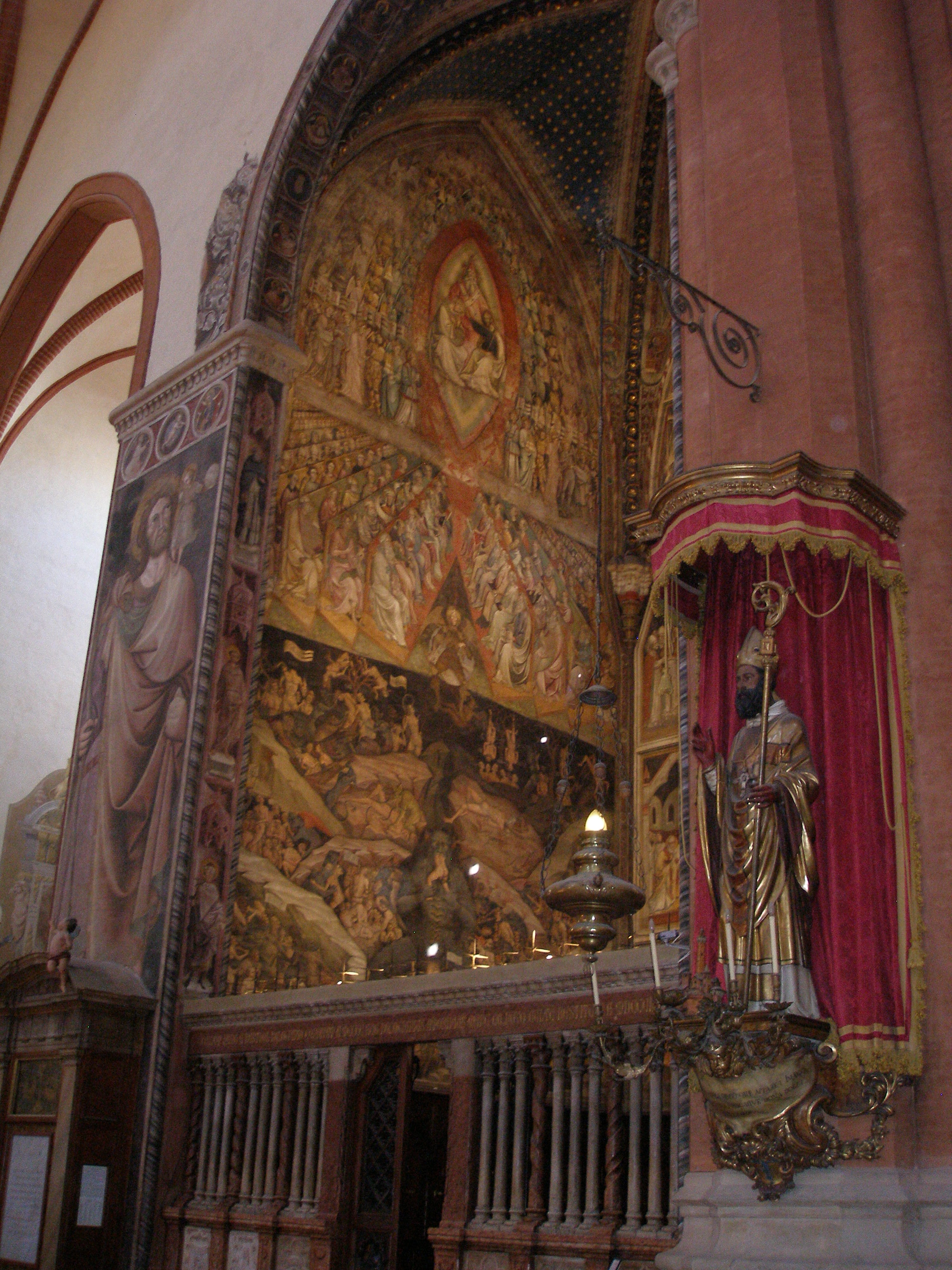 Bologna